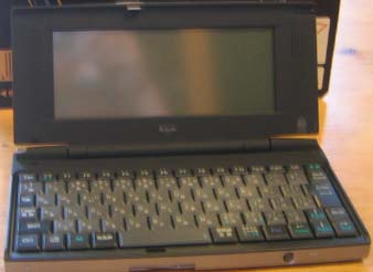 NEC Mobile Gear II for DoCoMo。大変解像度が低く低品質な画像のため、より高品質な画像をお持ちの方が居られましたら差し替えていただければと思います。